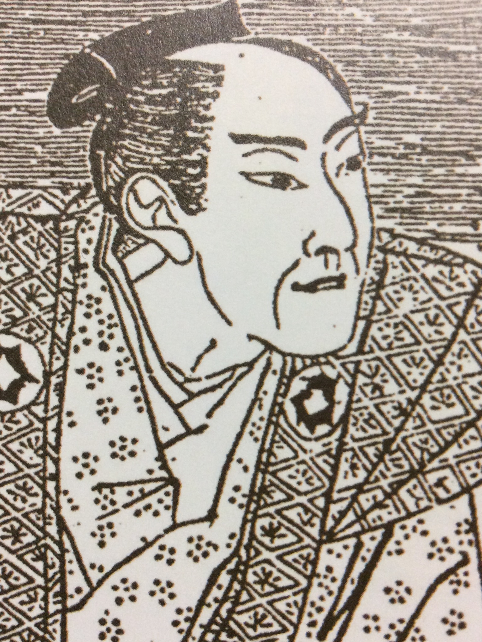 大岡忠相像、国立国会図書館蔵